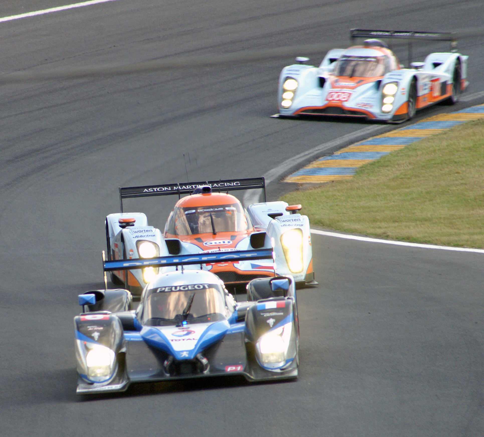 Le Mans 2009